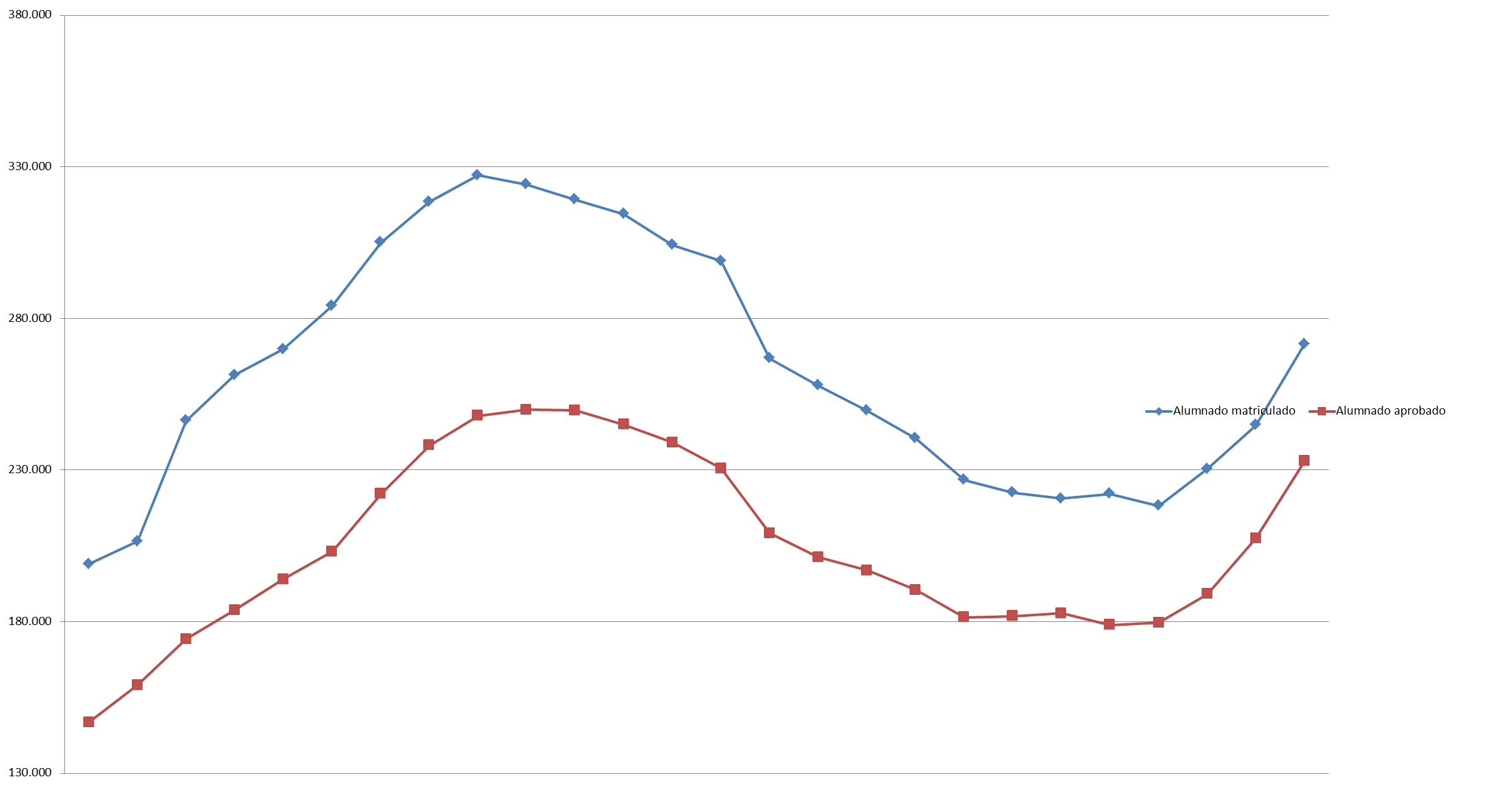 Gráfico sobre las estadísticas de selectividad (número de presentados y número de aprobados)